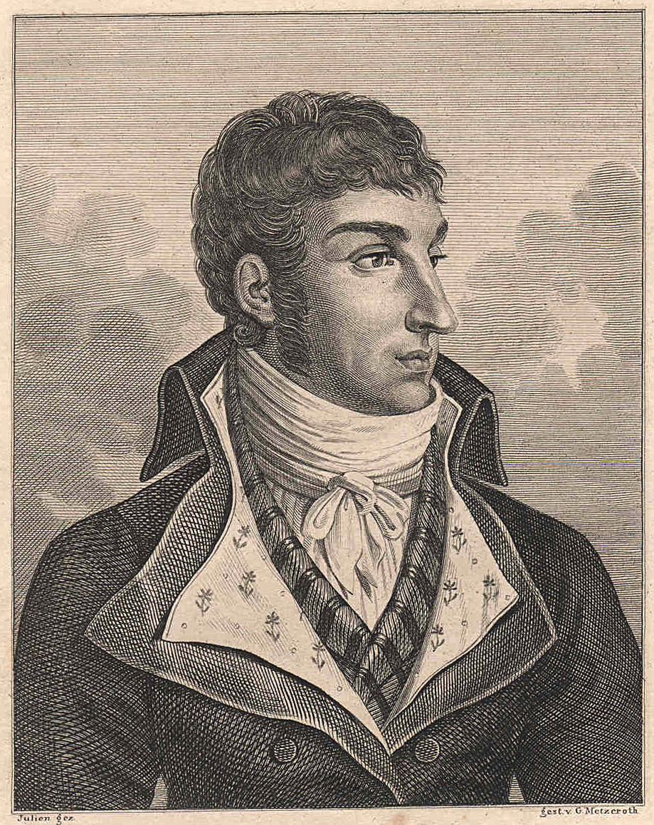 Gravure taille douce du Prince Jules de Polignac (1780-1847).